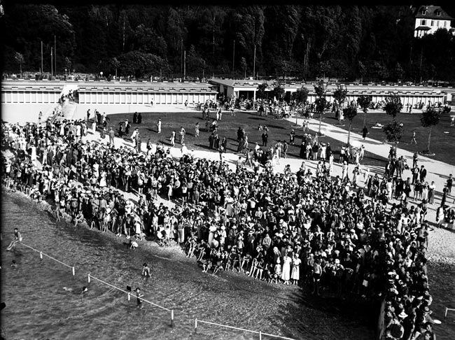 Frank-Henri Jullien (1882-1938), Genève-Plage, Spectacle au plongeoir, juin 1934, négatif au gélatino-bromure d’argent sur verre, 13 x 18 cm, inv. VG N 13 x 18 7441